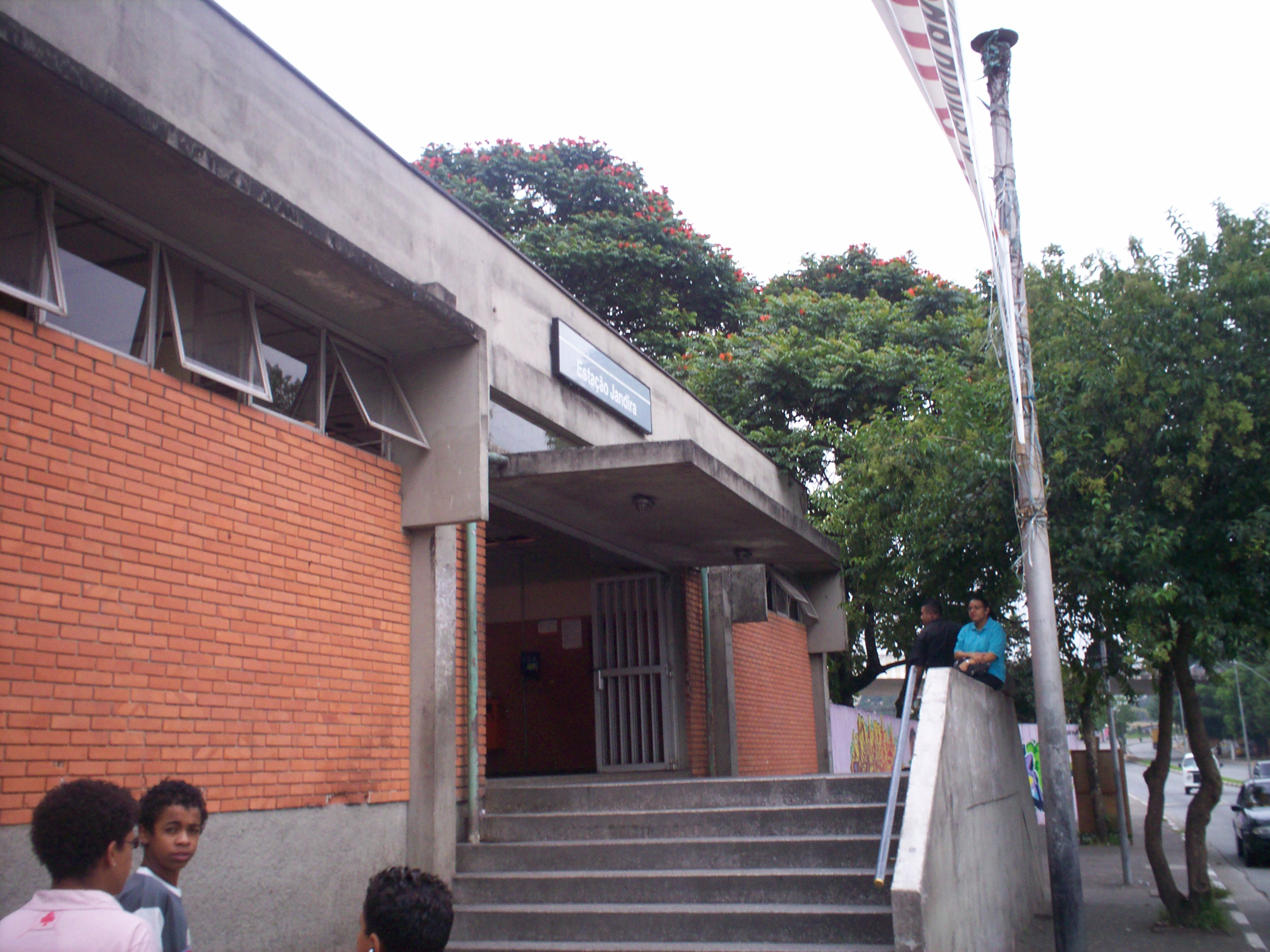 Entrada da Estação Jandira (linha 8 da CPTM). O prédio atual foi inagurado em 11 de março de 1983 pela então FEPASA.